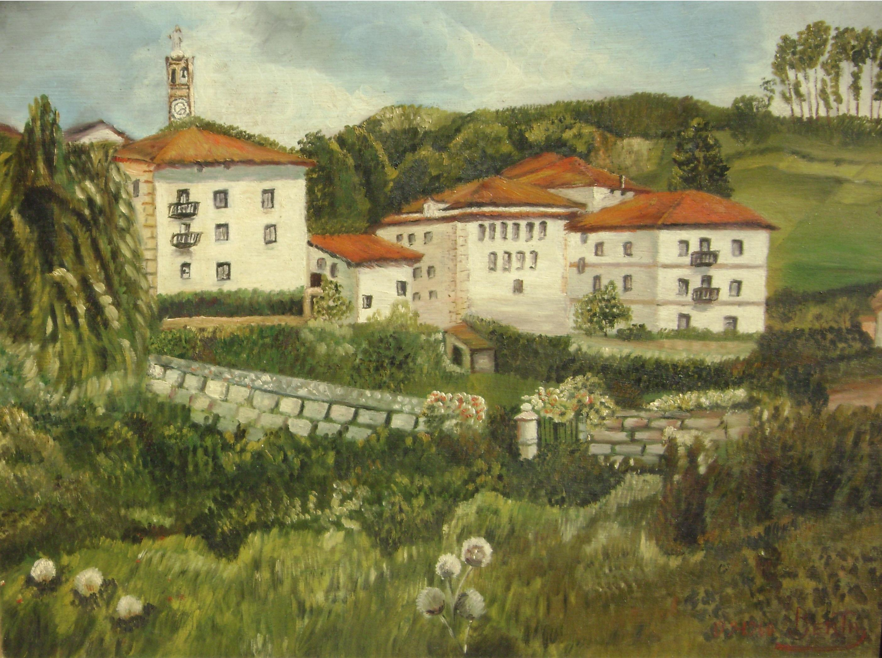 Ibarrangelu. Vista del pueblo de Ibarranguelua. Bizkaia. Euskadi. 19.09.1860